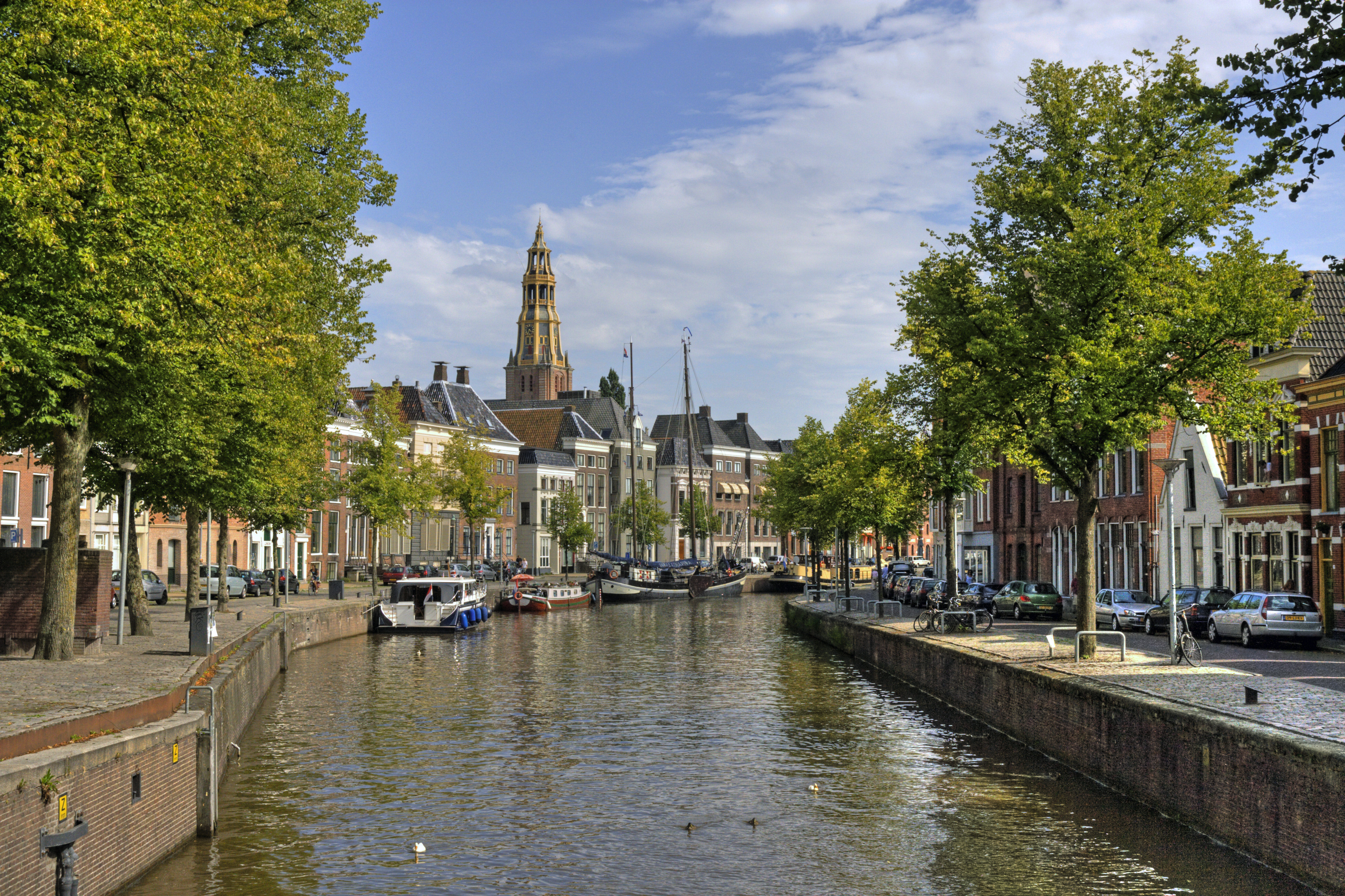 Hoge der A en Lage der A gezien vanaf de Vissersbrug (Groningen, Nederland)